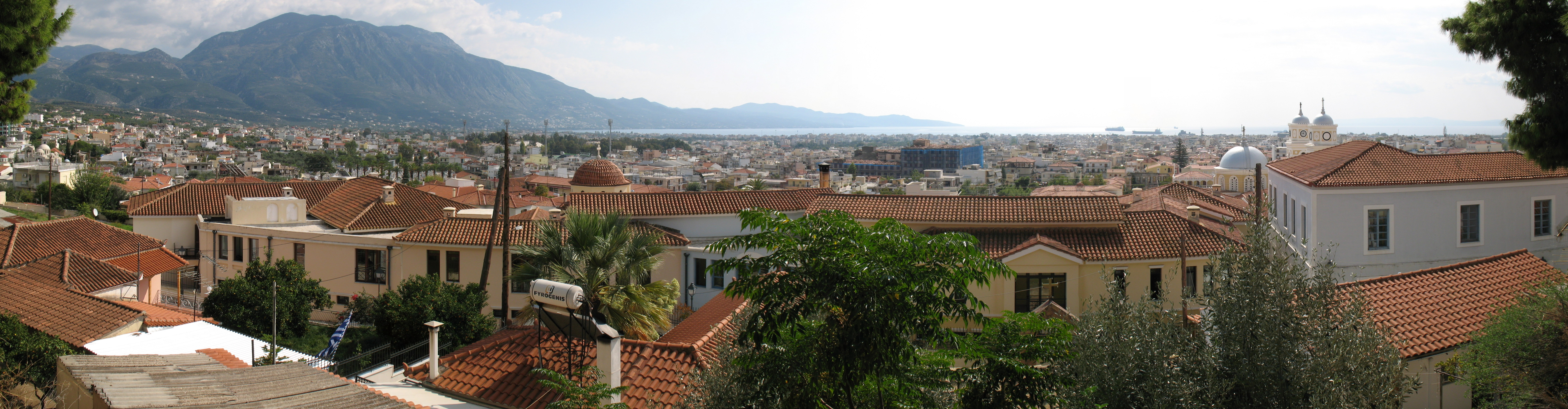 Kalamata from Castle (7'700x2'000px)